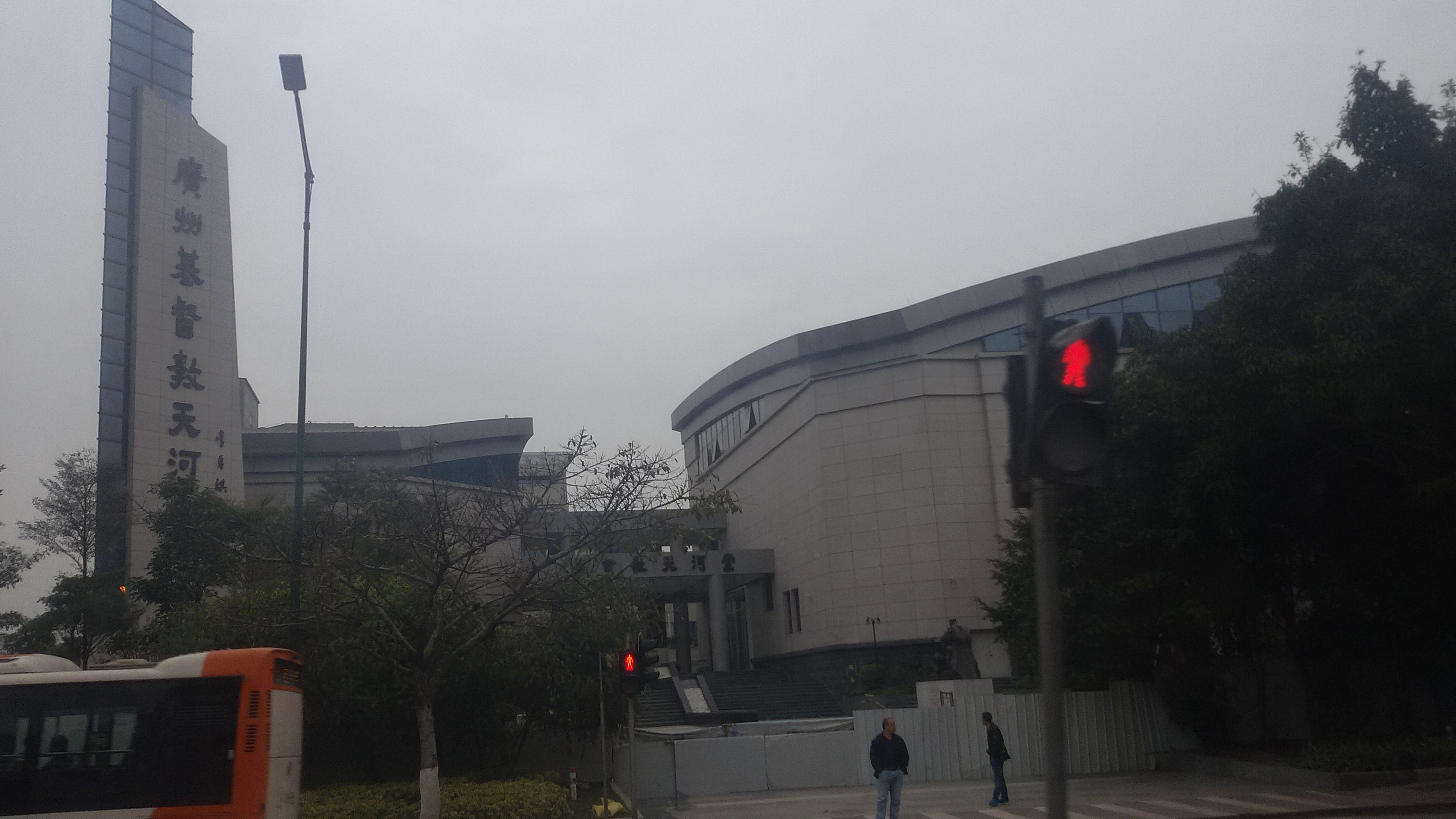 粵語: 廣州基督教天河堂